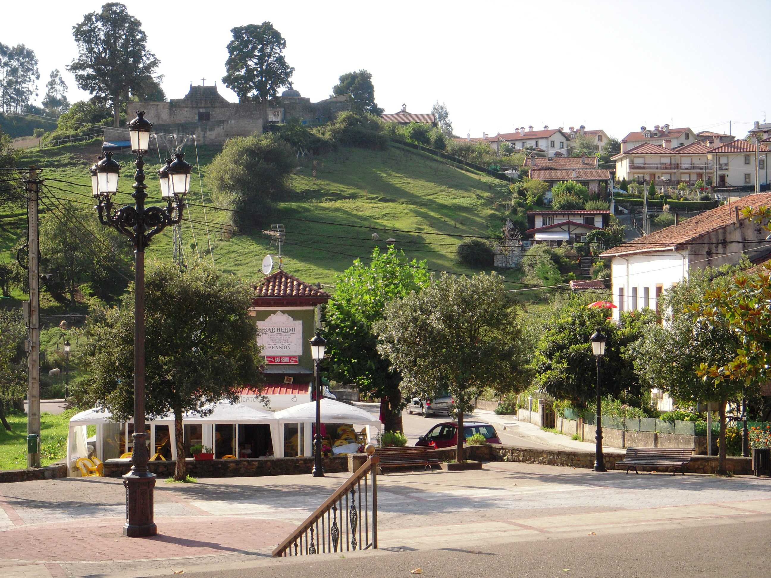 Desde la Iglesia de San Pedro Apóstol